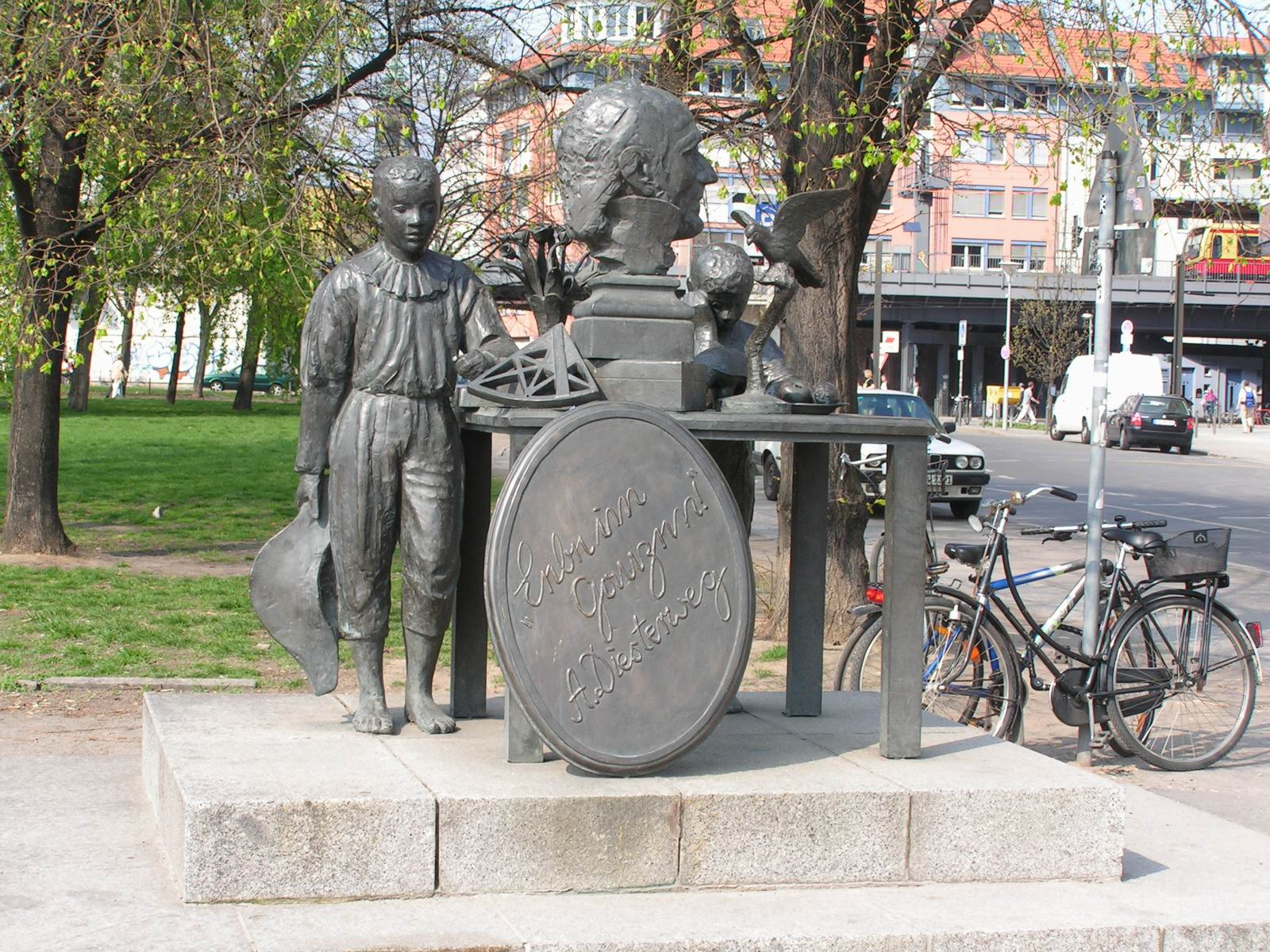 Berlin, Denkmal für Adolf Diesterweg